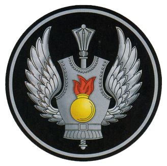 Нарукавная нашивка